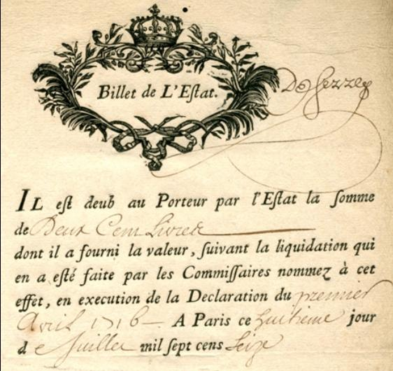 Billet de l'Estat (i.e. : l’État) émis le 8 juillet 1716 d'une valeur de 200 livres dans le cadre de l'opération de conversion de toutes les créances sur le Trésor décidée par un arrêt de décembre 1715.